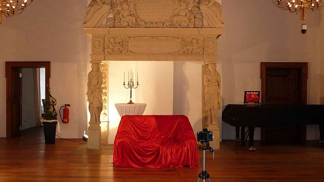 Kamin im Rittersaal von Haus Lüttinghof in Gelsenkirchen-Hassel